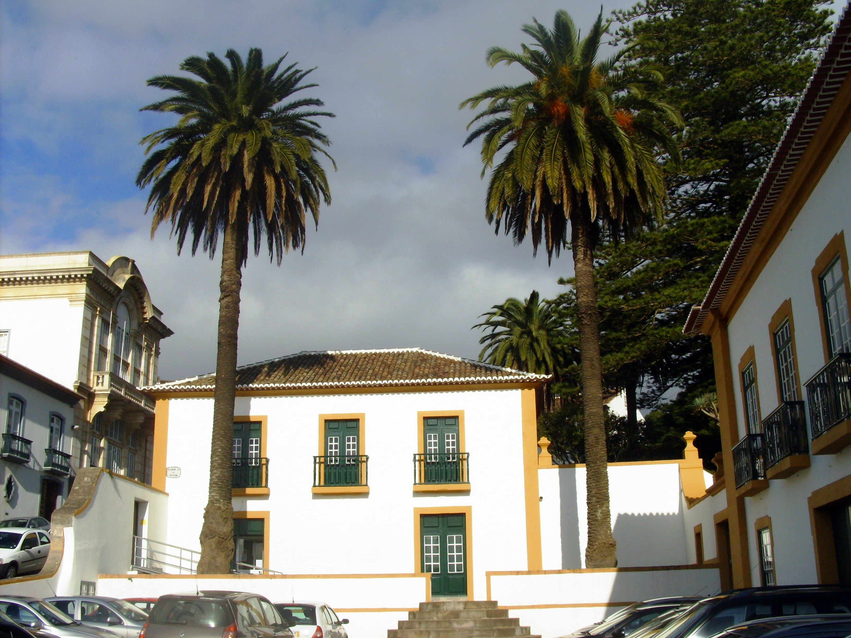 Palácio dos Capitães-Generais, Angra do Heroísmo, Ilha Terceira, Açores: antigo edifício do Colégio Novo, actual Direcção Regional das Comunidades.